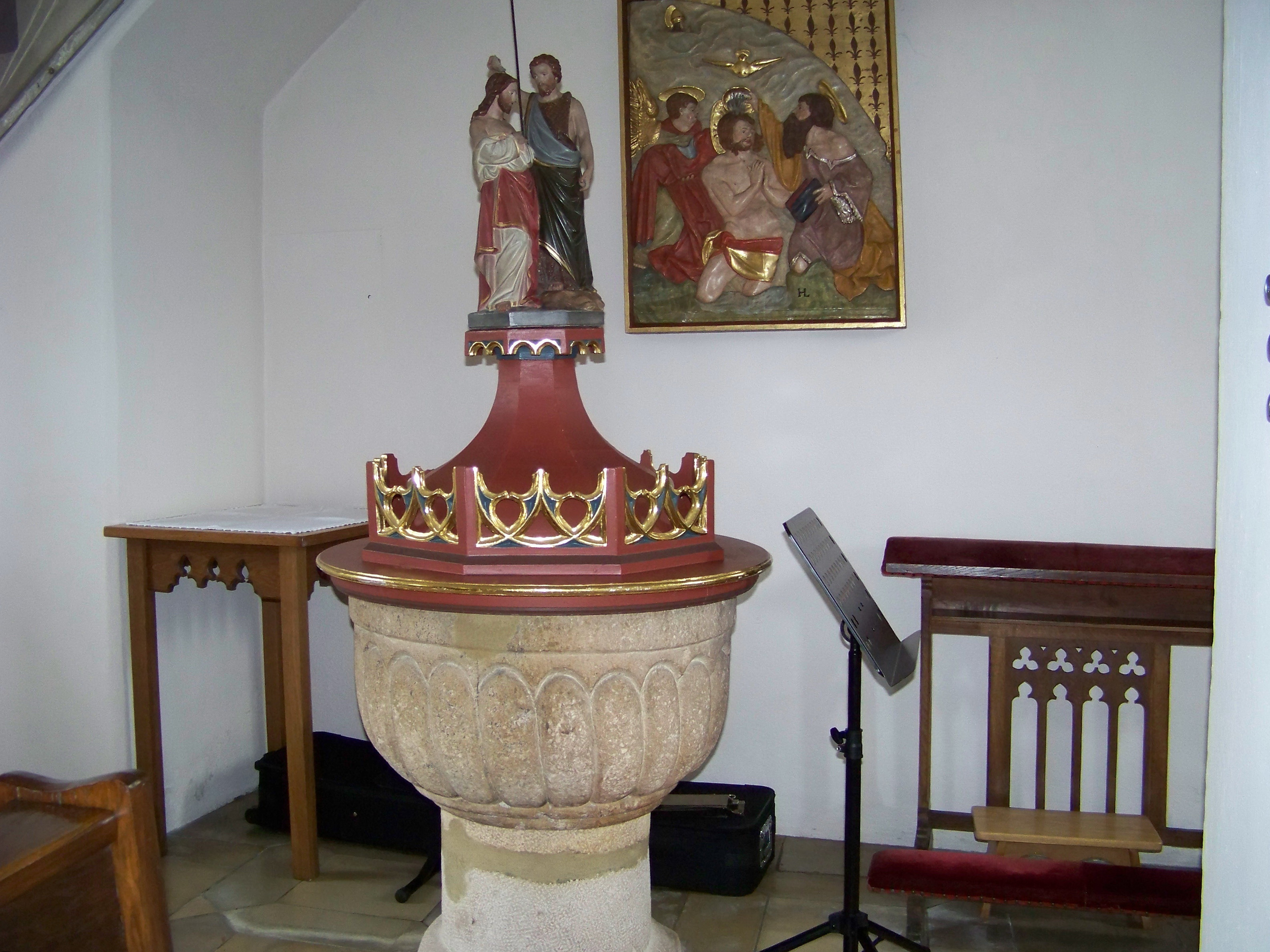 Kirchberg (Kröning) Pfarrer-Spirkner-Straße 5. Katholische Pfarrkirche St. Florian und St. Wolfgang. Saalbau mit eingezogenem Chor und angebauten Seitenschiffen. Anlage aus der zweiten Hälfte des 15. Jahrhunderts. Granit Taufstein auf quadratischem Fuß mit rundem Ständer. Rundes, massiges Muschelbecken, spätromanisch aus dem 12. - 13. Jahrhundert.